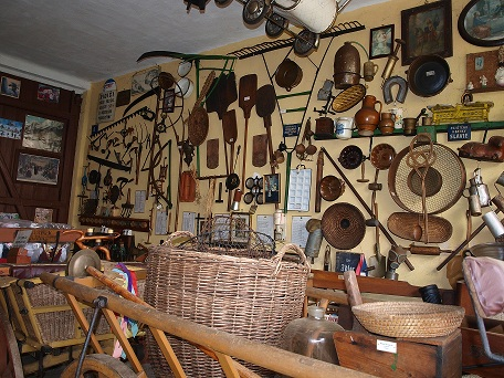 Rolnické muzeum manželů Kopečkových v Příložanech